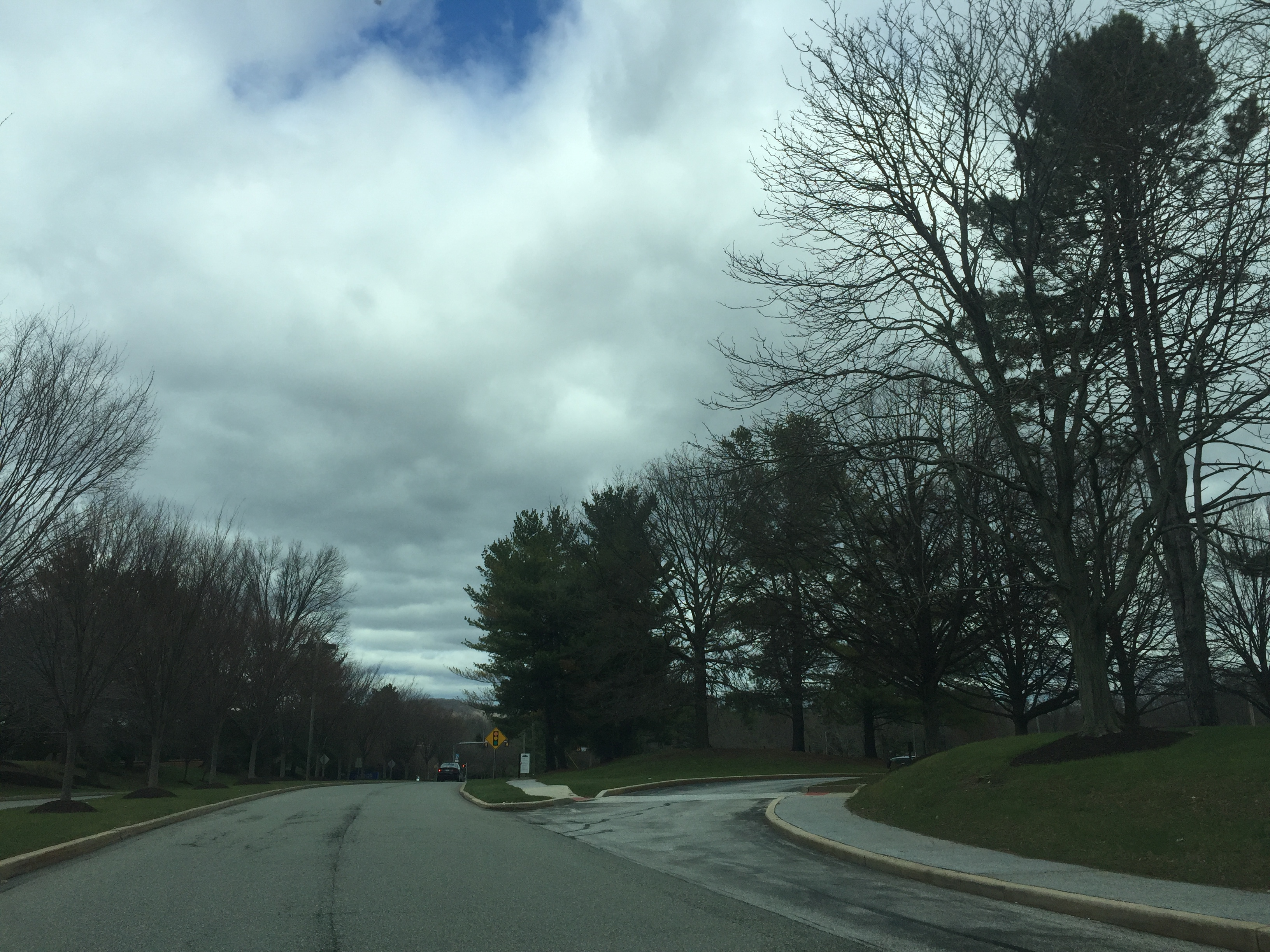 Chesterbrook entrance